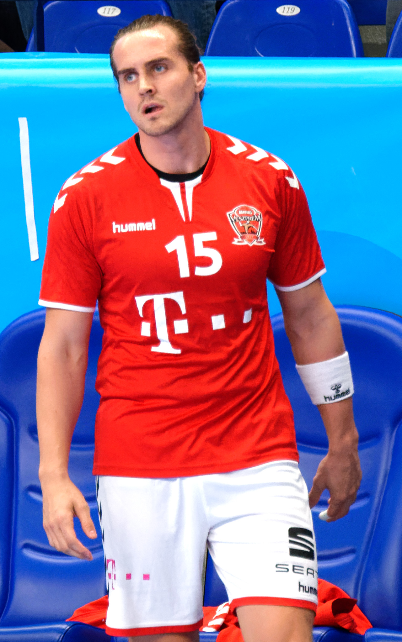 Rencontre de phase de groupe de la ligue des champions 2017/18 entre le PSG et Veszprem. A Coubertin, le 12 novembre 2017.